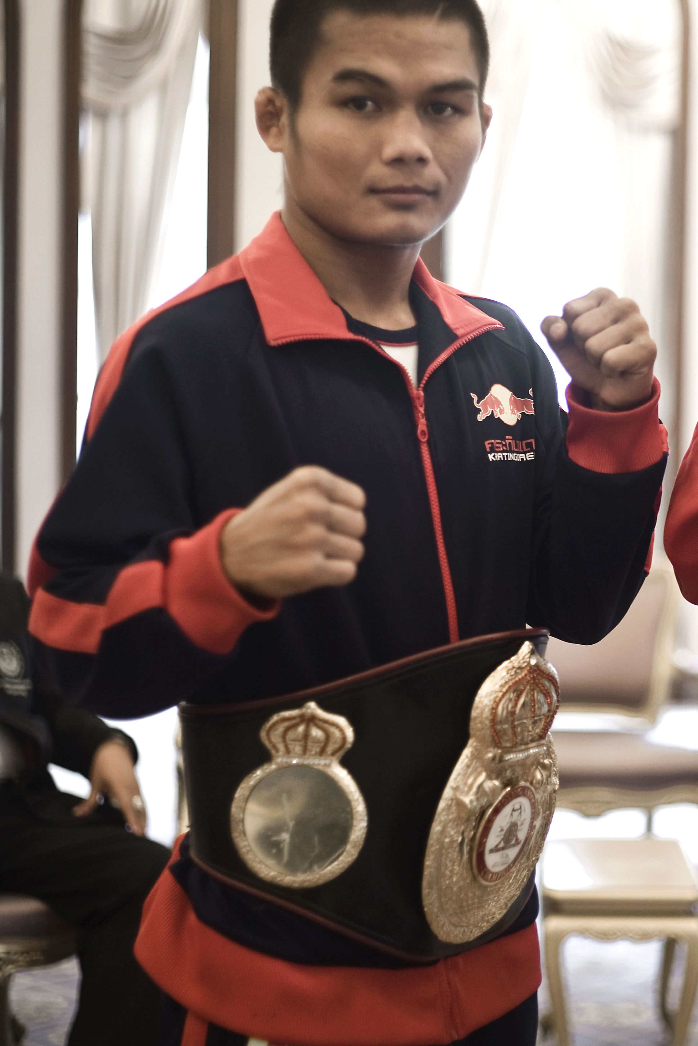 พูนสวัสดิ์ กระทิงแดงยิม Poonsawat Kratingdaenggym แชมป์ซูเปอร์แบนตั้มเวท WBA เข้าพบนายกรัฐมนตรี ณ ห้องสีม่วง ตึกไทยคู่ฟ้า ทำเนียบรัฐบาล 8ตุลาคม2552 (The Official Site of The Prime Minister of Thailand Photo by พีรพัฒน์ วิมลรังครัตน์)